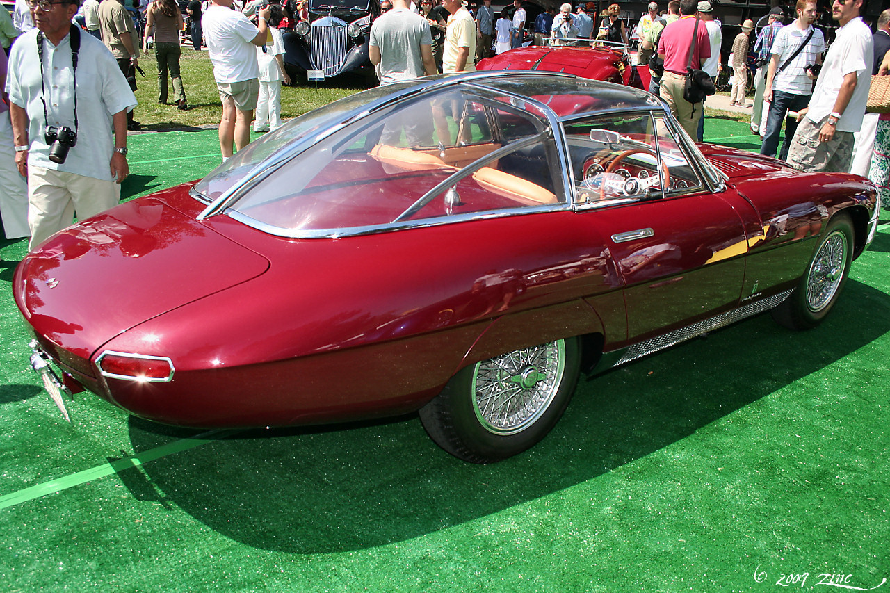 Pasadena Art Center Car Classic, July 7, 2007